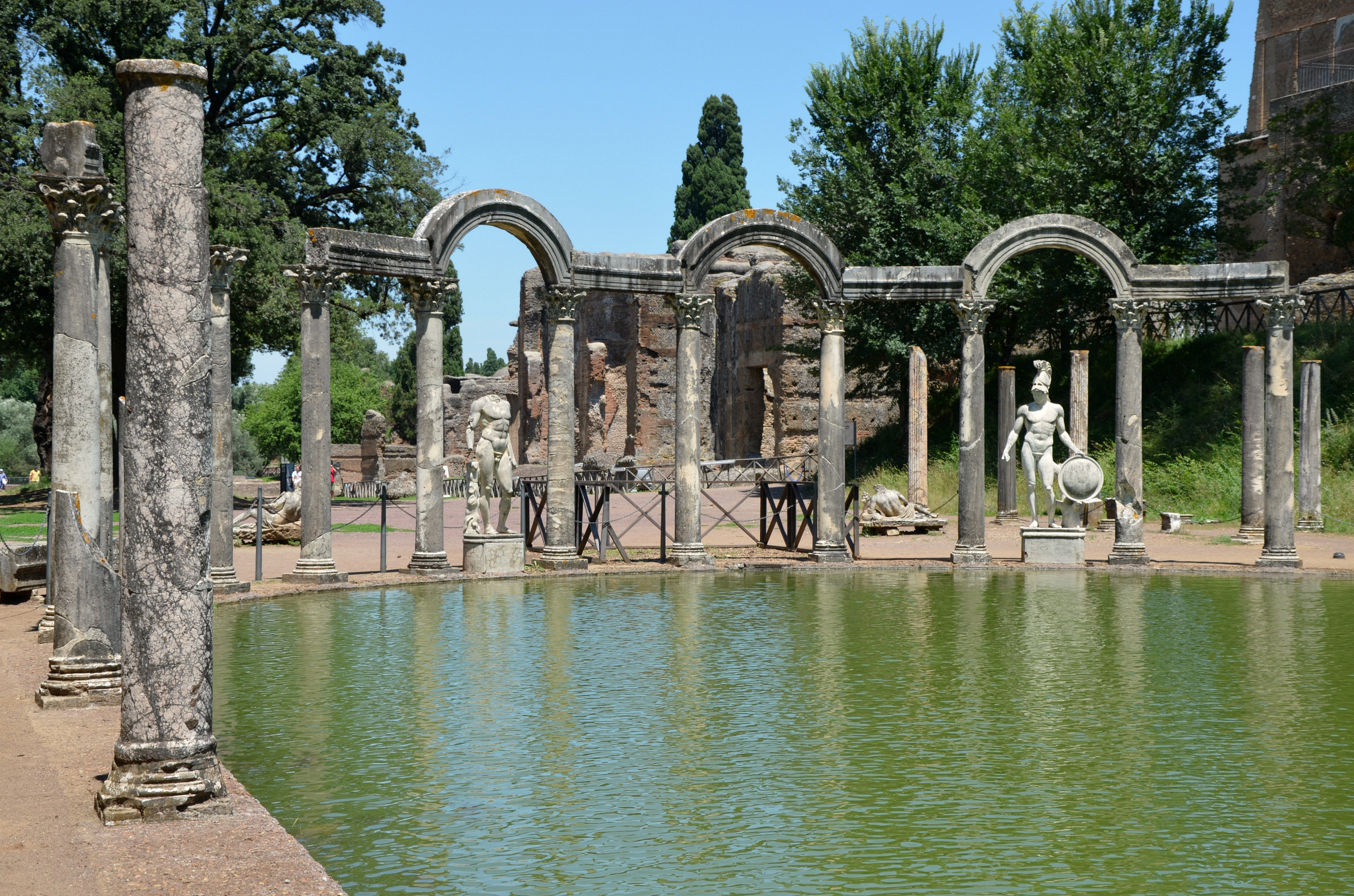 Hadrian's Villa, Tivoli